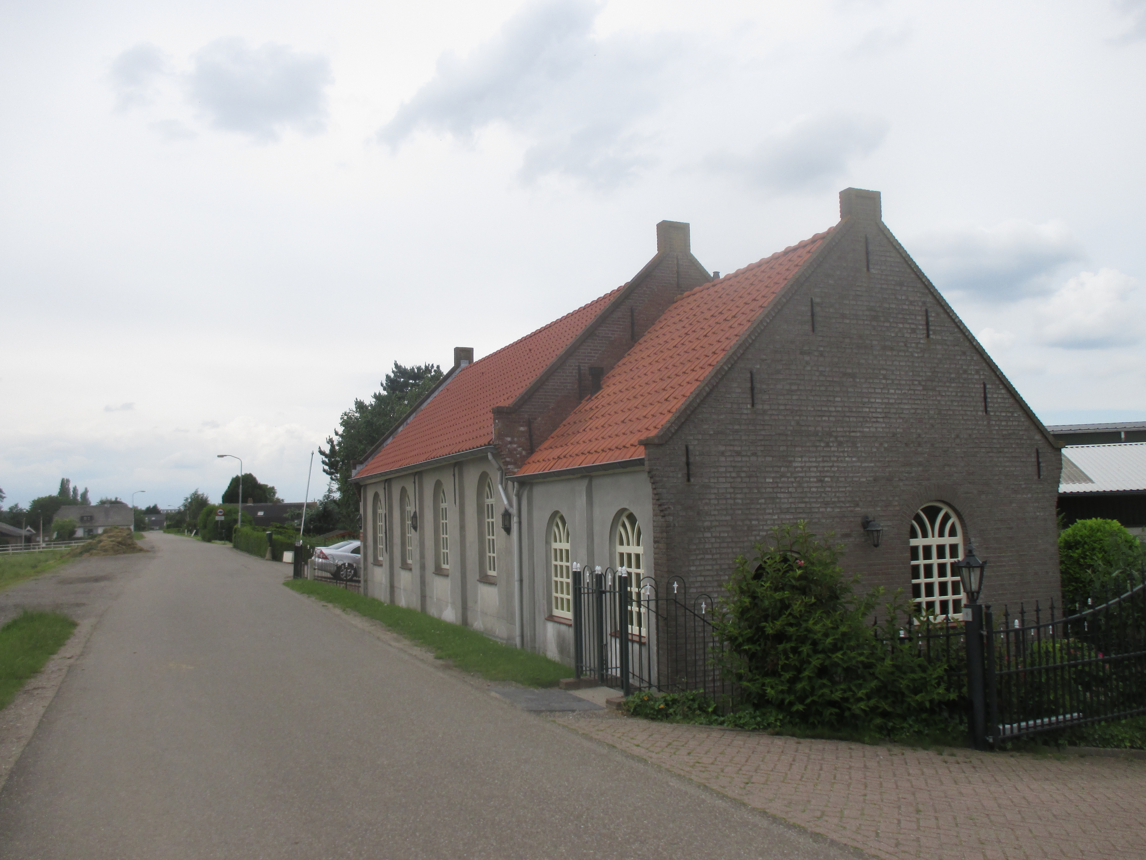 Christelijk Gereformeerde Kerk in Poederoijen